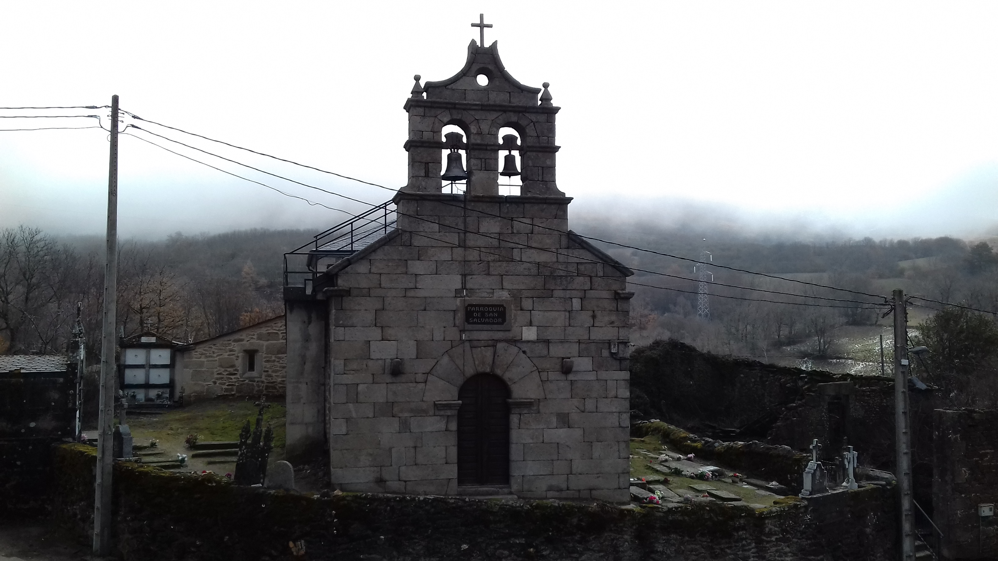 Igrexa parroquial de Villanueva de la Sierra, Pías